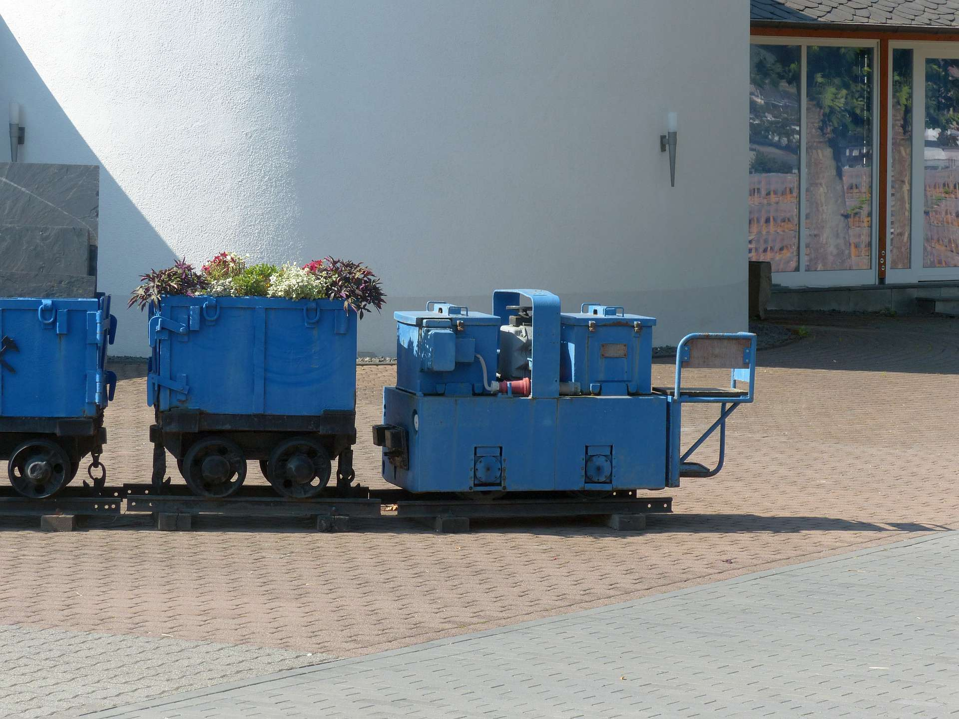 Mayen/Katzenberg, 23.08.2015